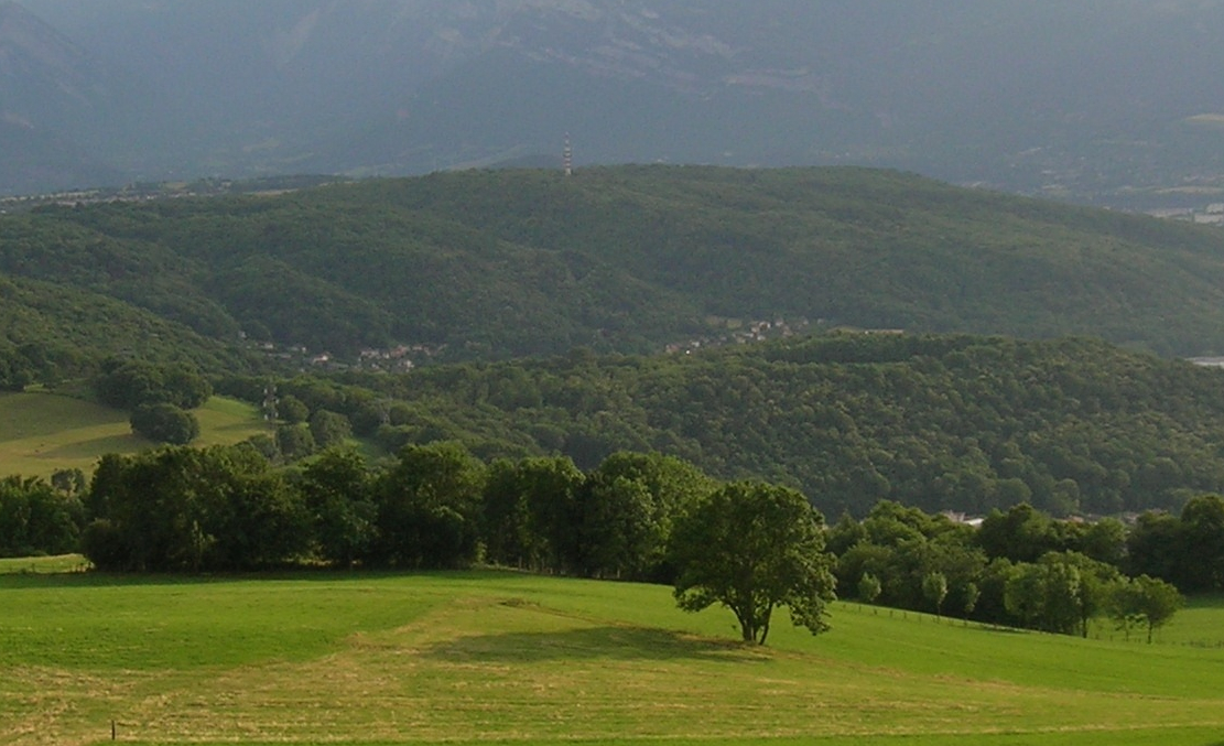 panorama de Bresson (Isère)